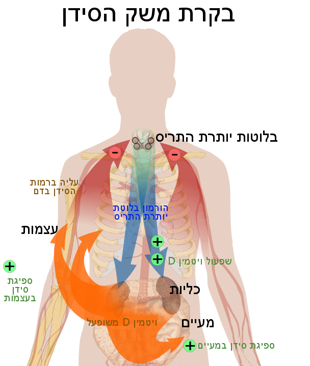 Calcium_regulation HE